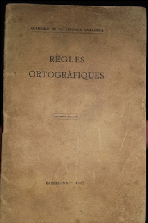 portada regles